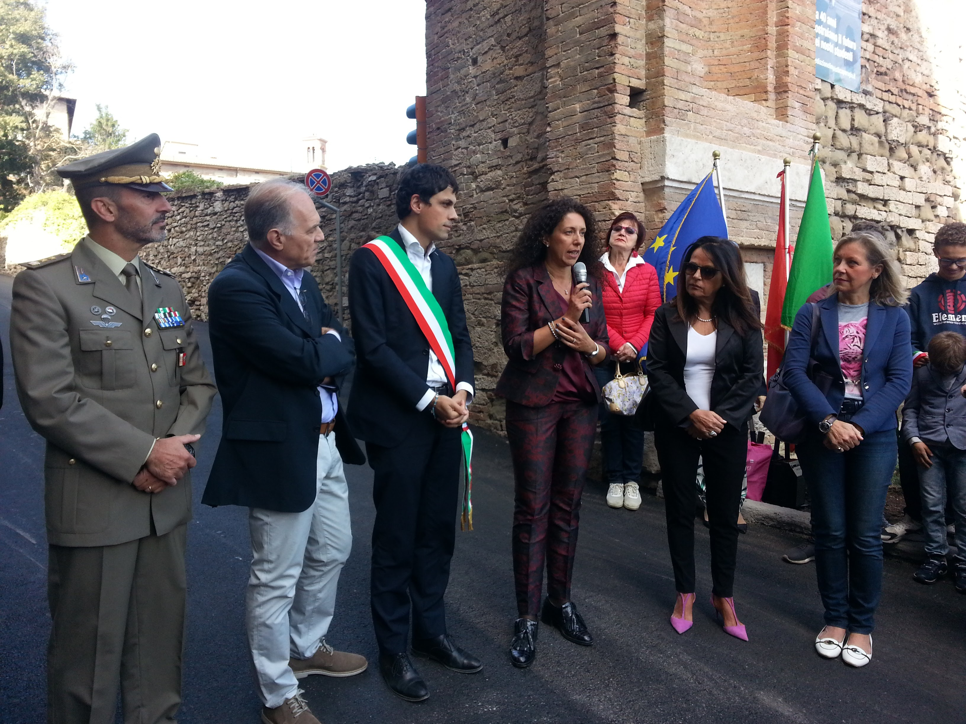 Inaugurazione restauro Porta SanGirolamo